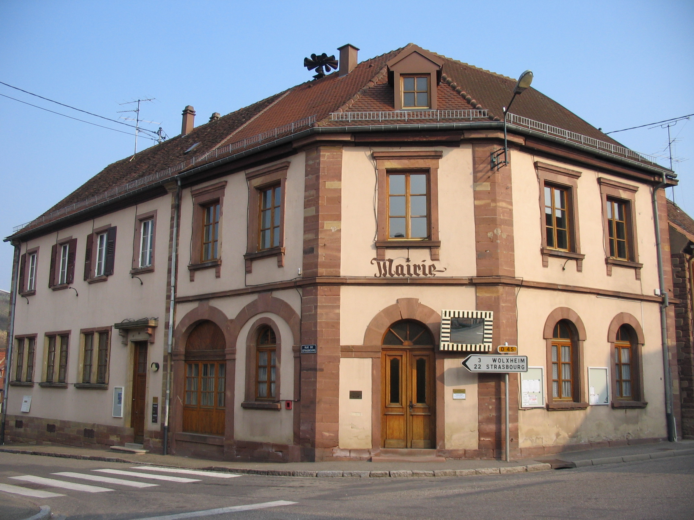 mairie de Soultz-les-Bains dans le Bas-Rhin.